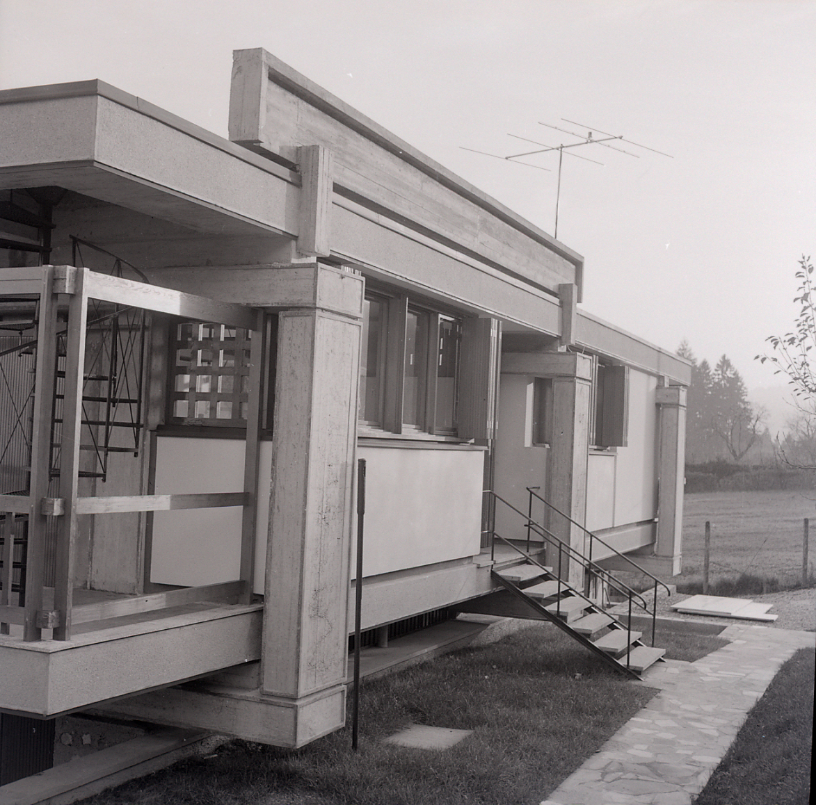 Servizio fotografico : Milano, 1970 / Paolo Monti. - Buste: 19, Fototipi: 20 : Negativo b/n, gelatina bromuro d'argento/ pellicola ; 6x6. - ((Serie costituita da 20 negativi identificati con i nn.: 16745-16763. Numerazione parallela : 57-74. Sulla busta R16745 manoscritto: "Arch./ Morisi". La suddetta serie è contenuta nella scatola identificata con la numerazione R16657-17048. - Fonte: Rubrica di Paolo Monti: Archivio 10x12 (ultimi numerati) - dal G1 al (s.d.), presso Archivio Paolo Monti